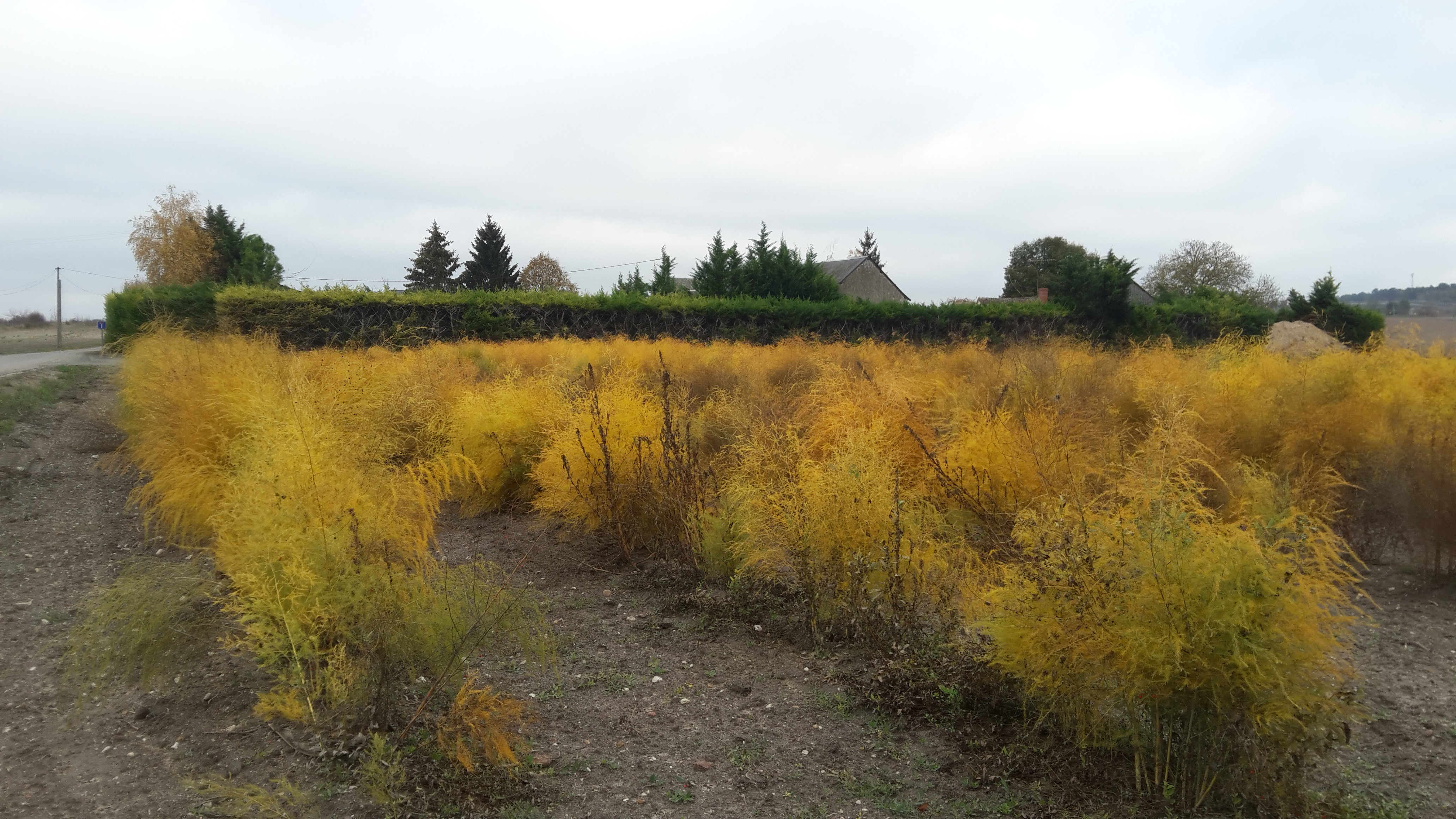 Aspergeraie en automne Touraine, novembre 2018